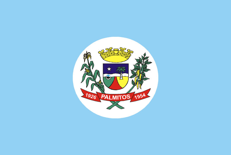 Bandeira do Município